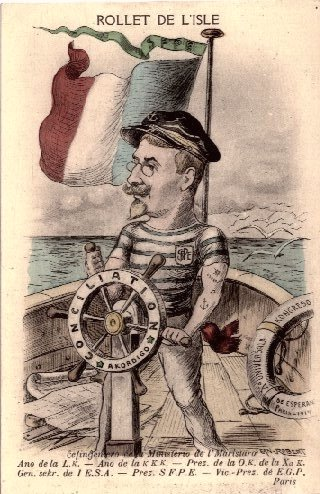 Maurice Rollet de l'Isle (1859-1943), ingénieur hydrographe de la marine français